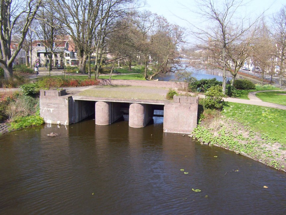 Voormalige Hanepraaisluis in Gouda, Eigen foto, gebruik vrij